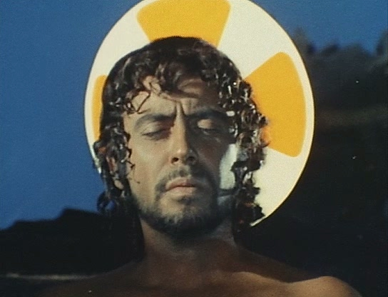 screenshot film Licensing 1972